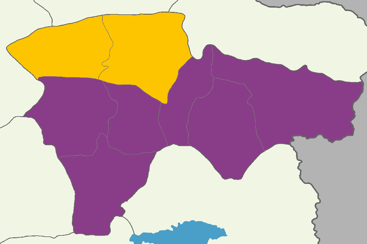 Ağrı'da 2014 Türkiye cumhurbaşkanlığı seçimi sonuçları